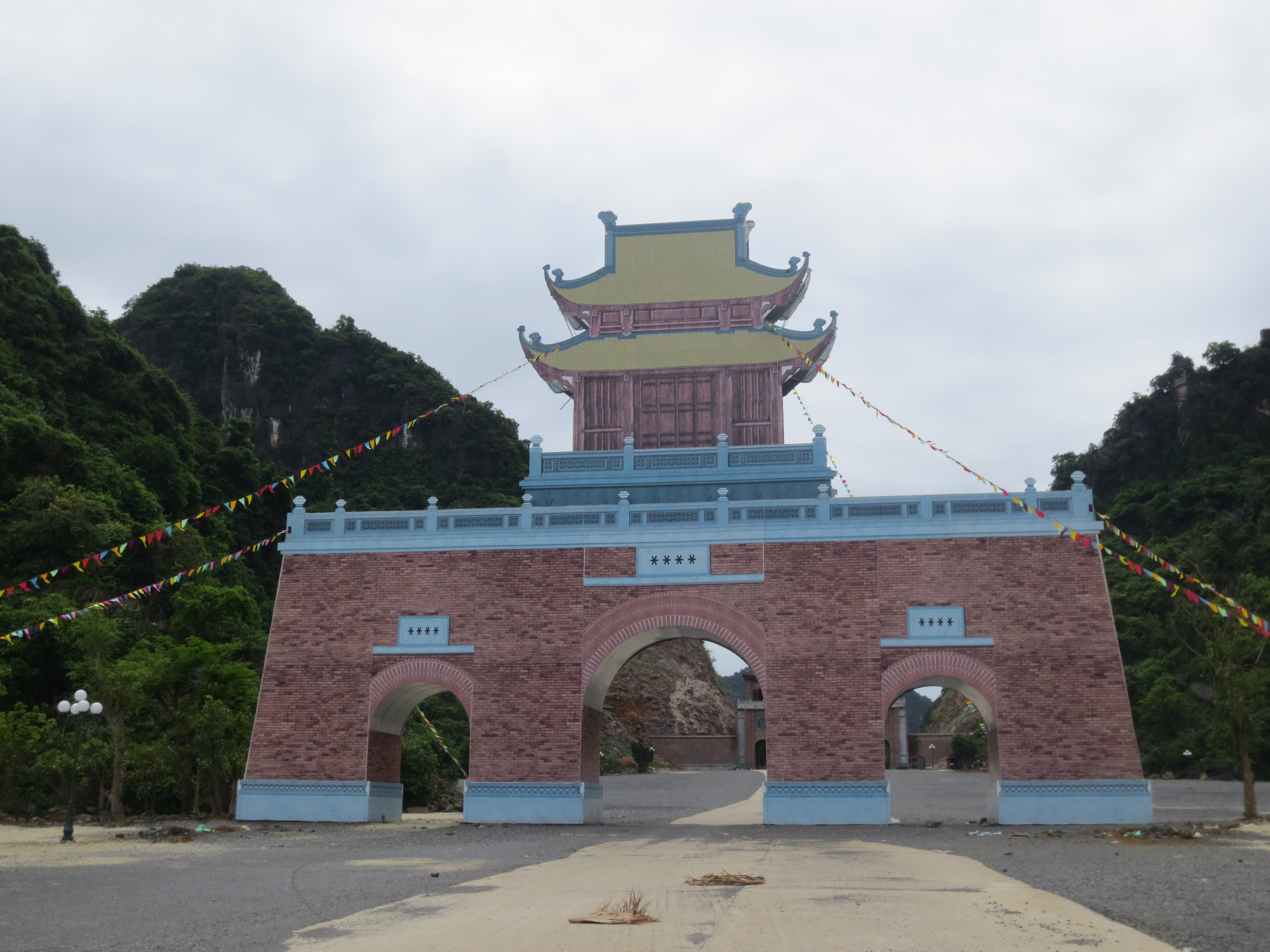 Cổng Địa Môn Đàn Kính Thiên Tràng An, Ninh Bình